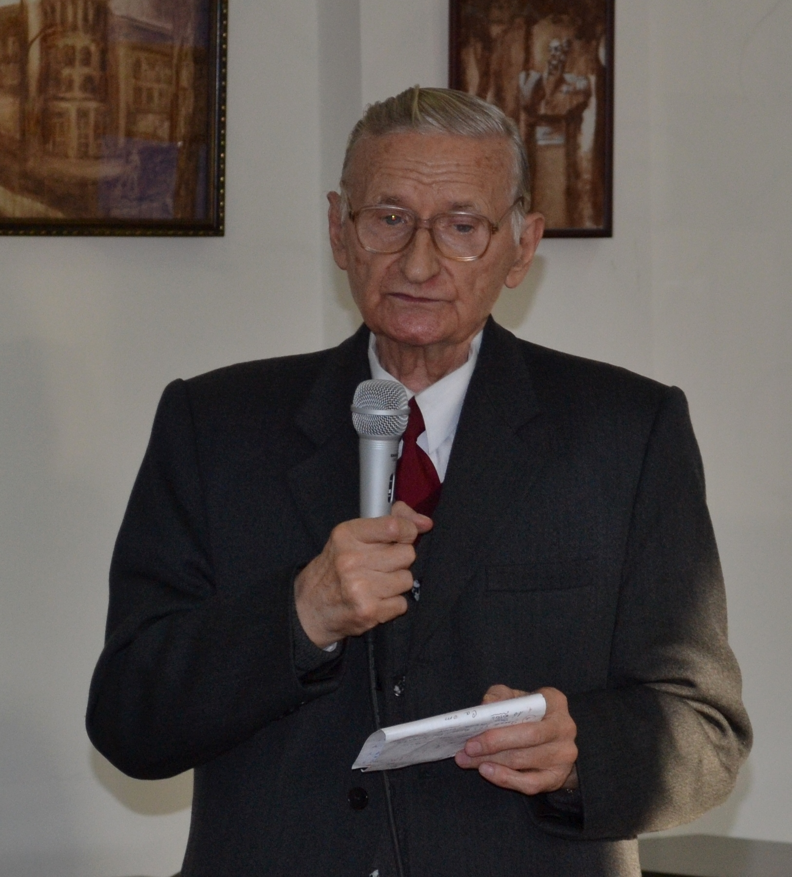 Anatol Ciobanu la lansarea de carte „Eminescu: arta și filosofia iubirii”, de Mihail Dolgan.